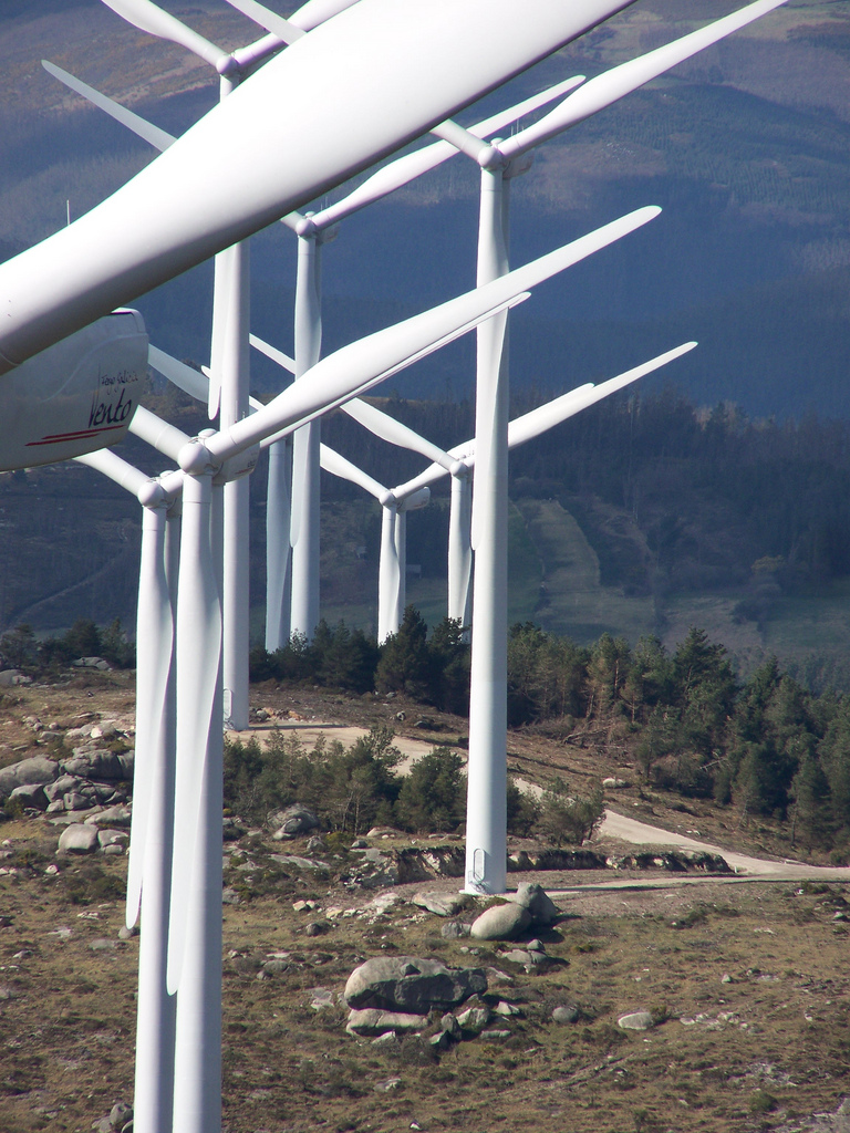 Romariz, Abadín, Galiza